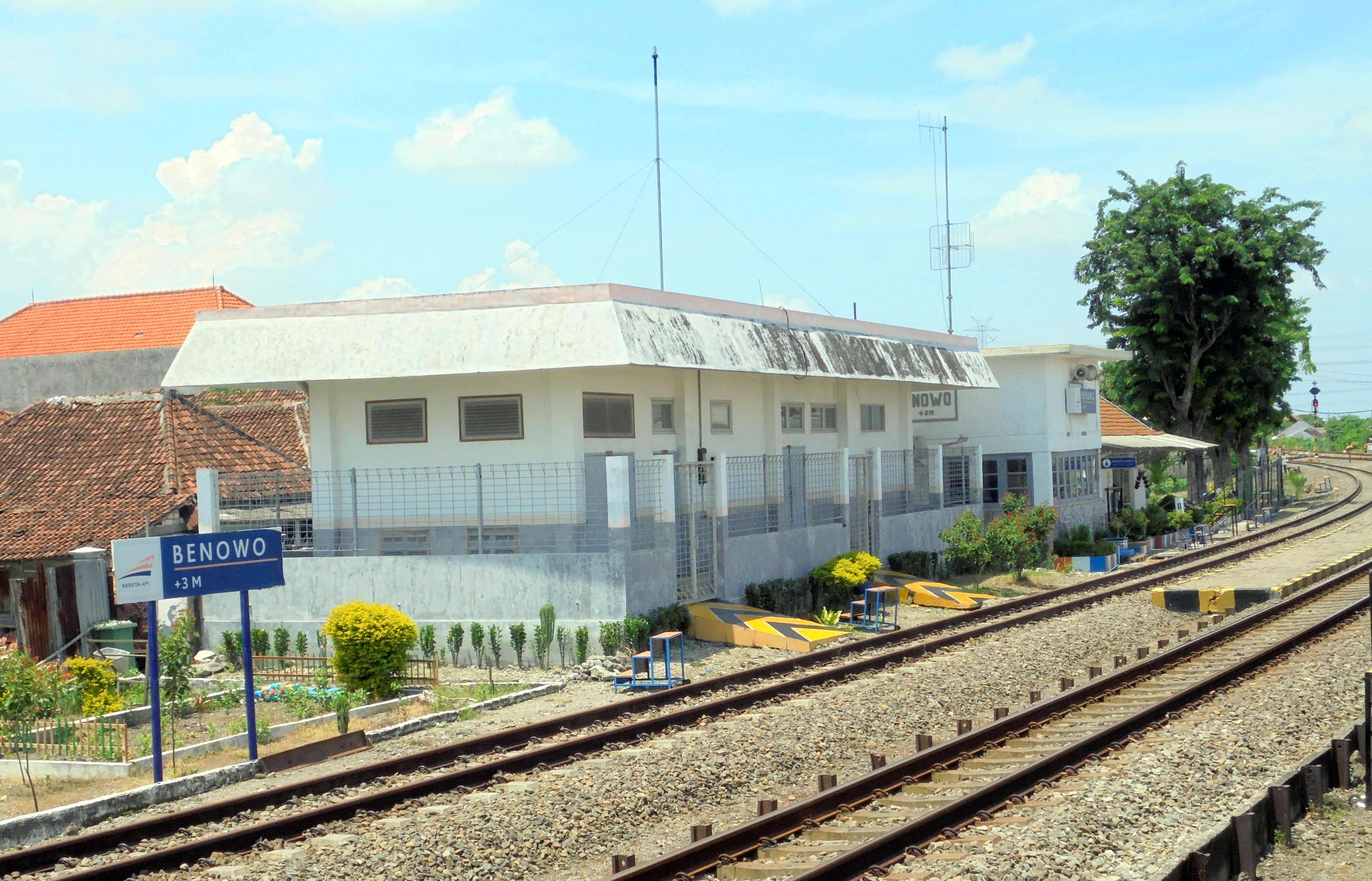 Peron Stasiun Benowo tahun 2020